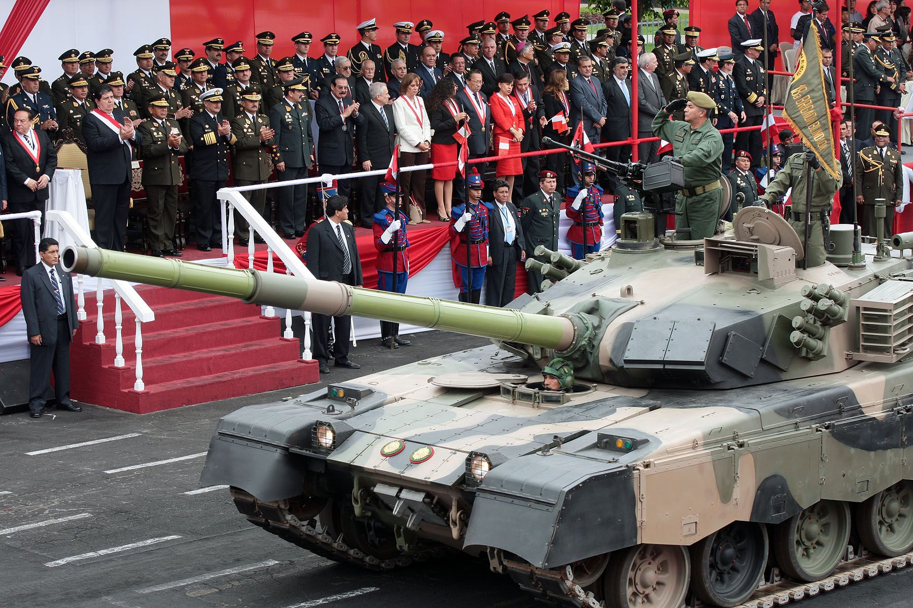 Desfile Militar 2009/07